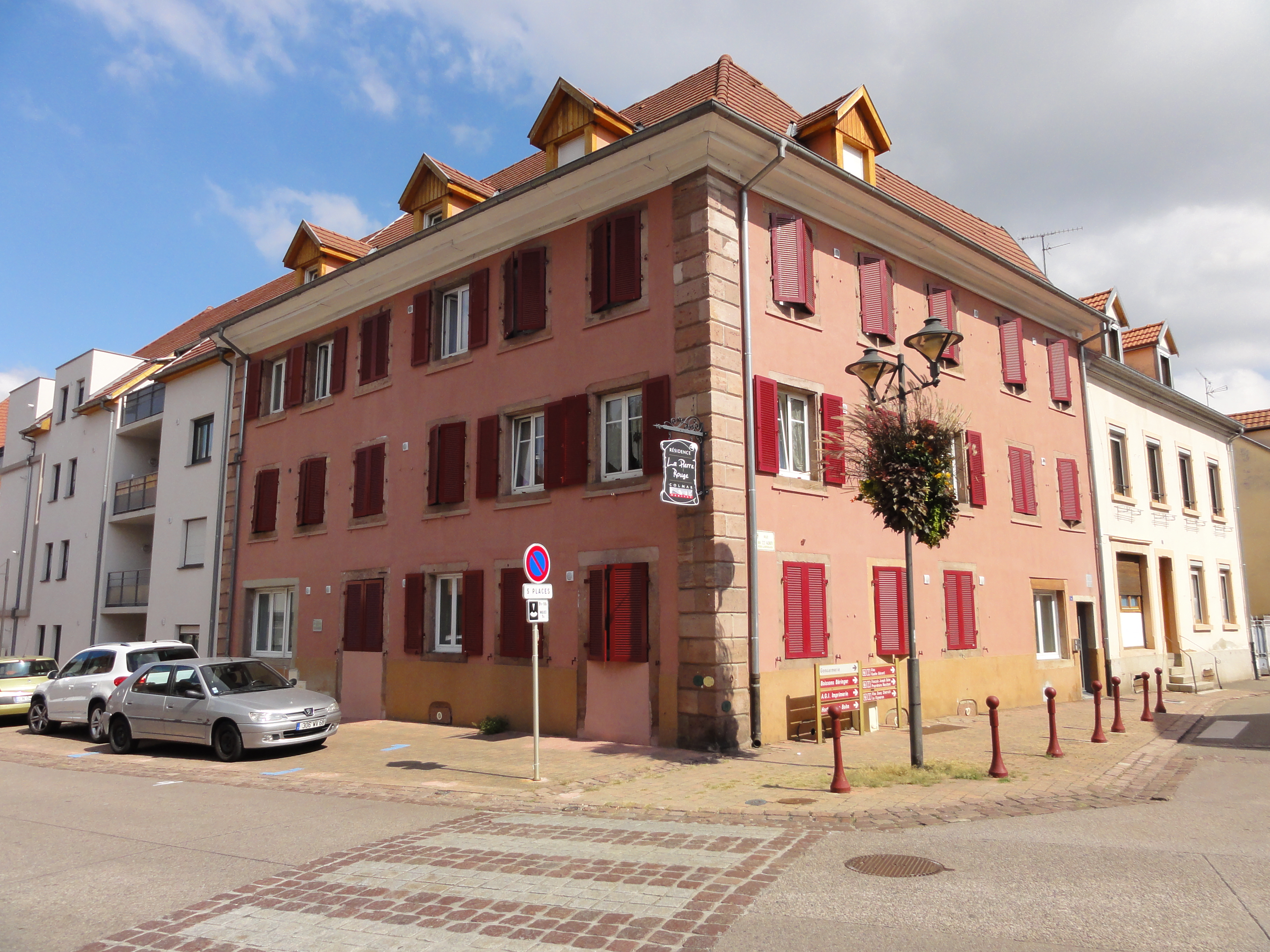 Alsace, Haut-Rhin, Ingersheim, Maison 1A rue du 22-Août.